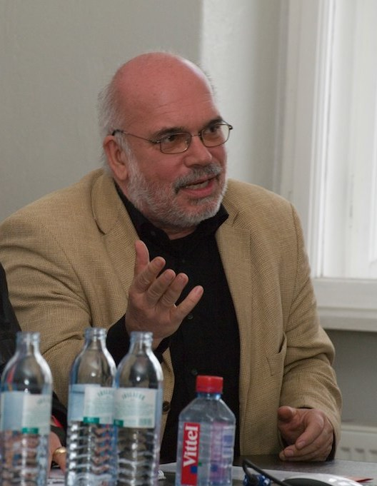 Dirk Krischenowski, Wolfgang Kleinwächter, Annette Mühlberg, Sebastian Utz, Oliver Passek, „Droht die Spaltung des Internet? …“, Kalkscheune Workshop I